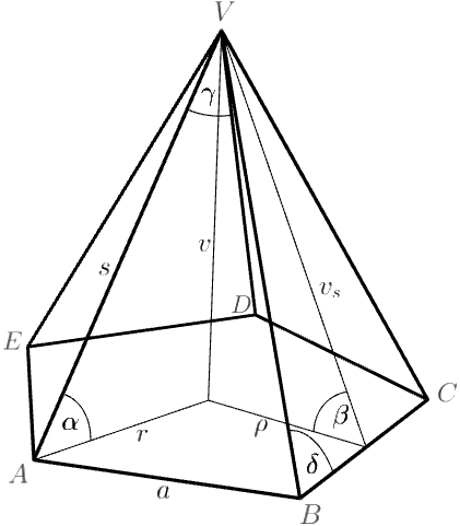 Jehlan